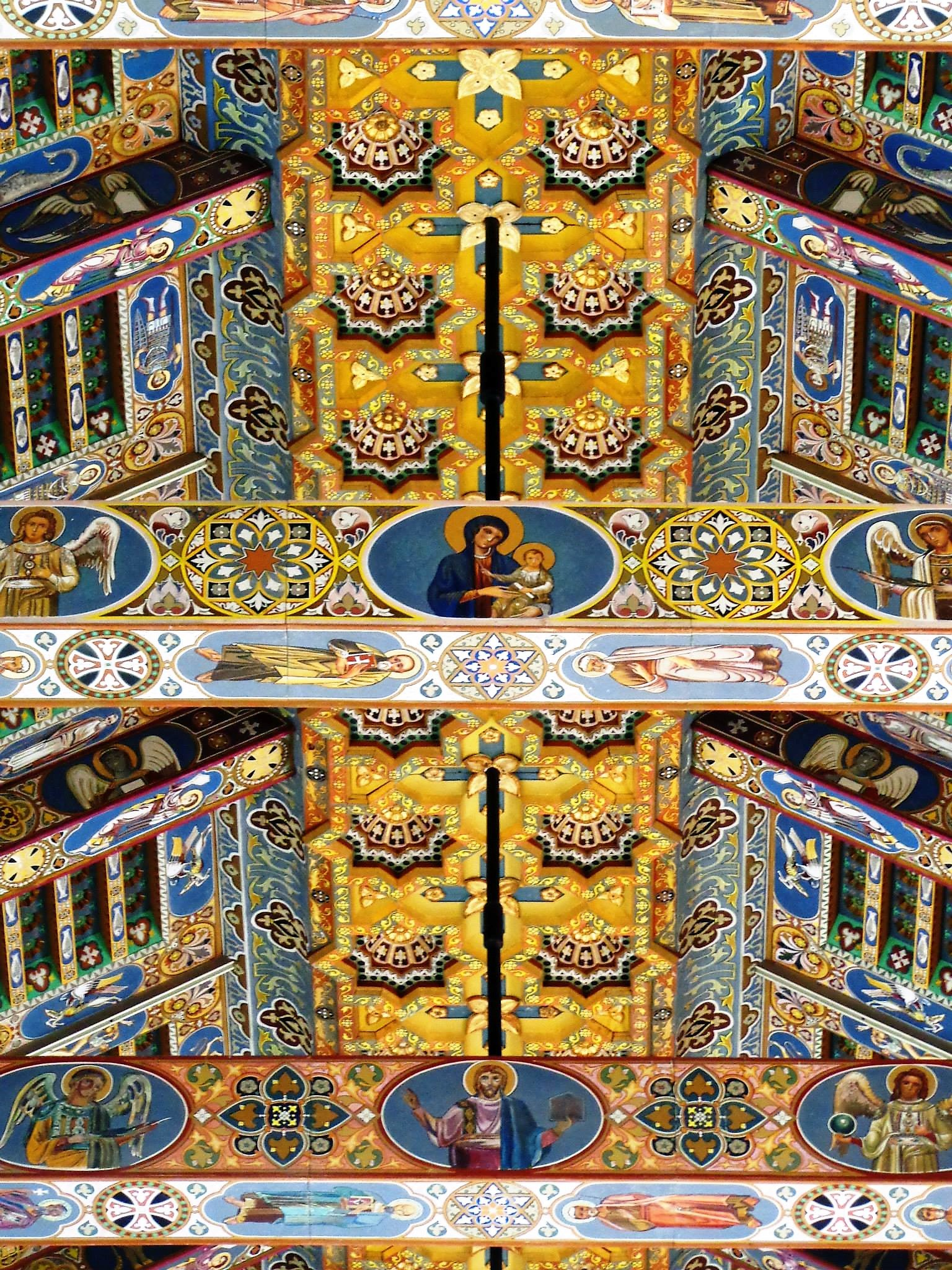 Dettaglio tetto ligneo